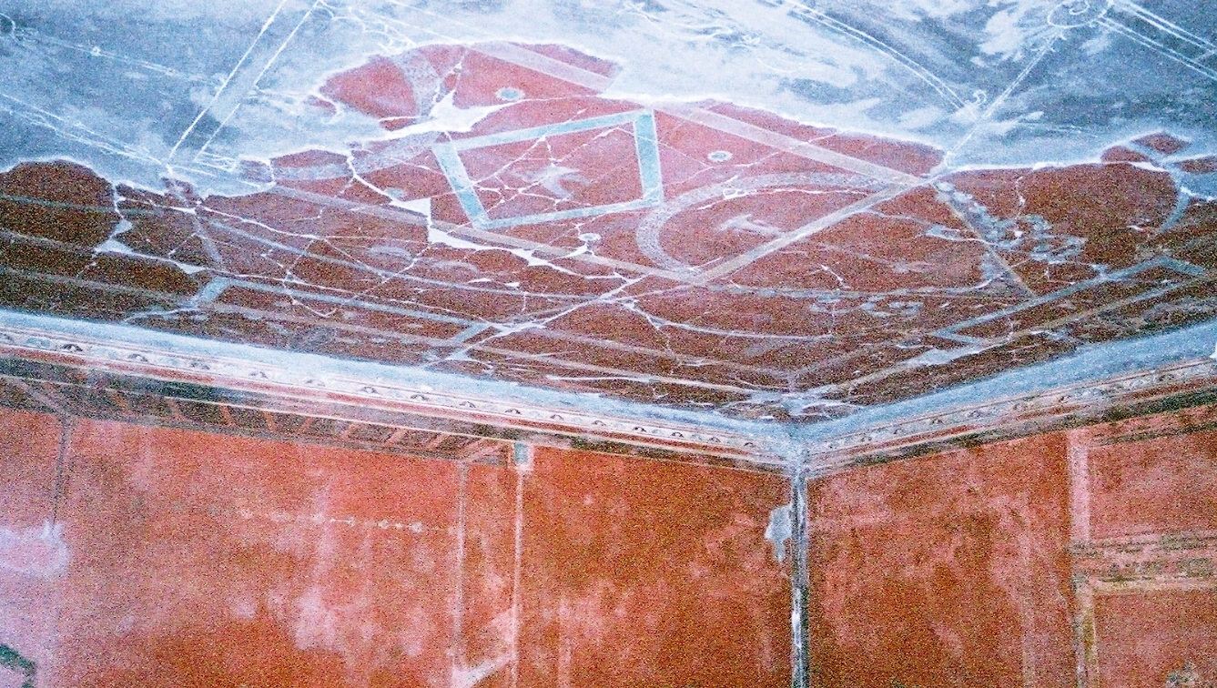 Détail d'une fresque de la villa de Poppée à Oplontis (Italie)